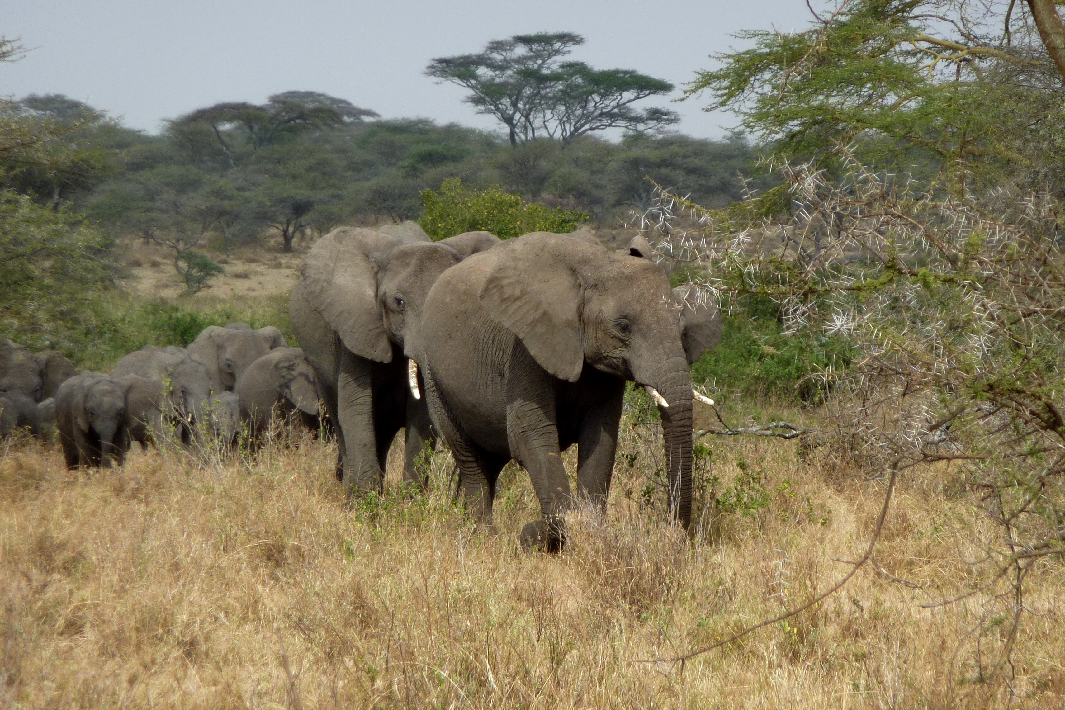 Afrikanische Elefant (Loxodonta africana)